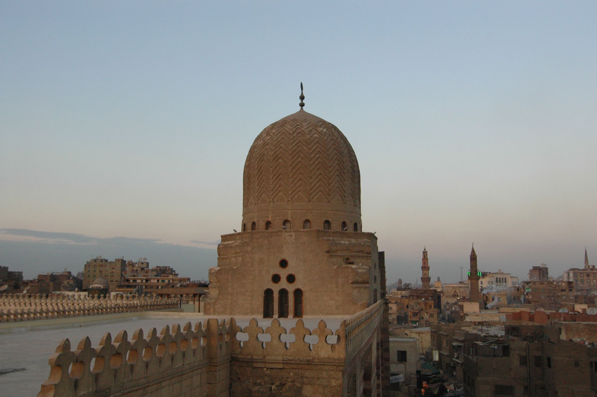 Cairo: minareto della Moschea el-Muhayyad